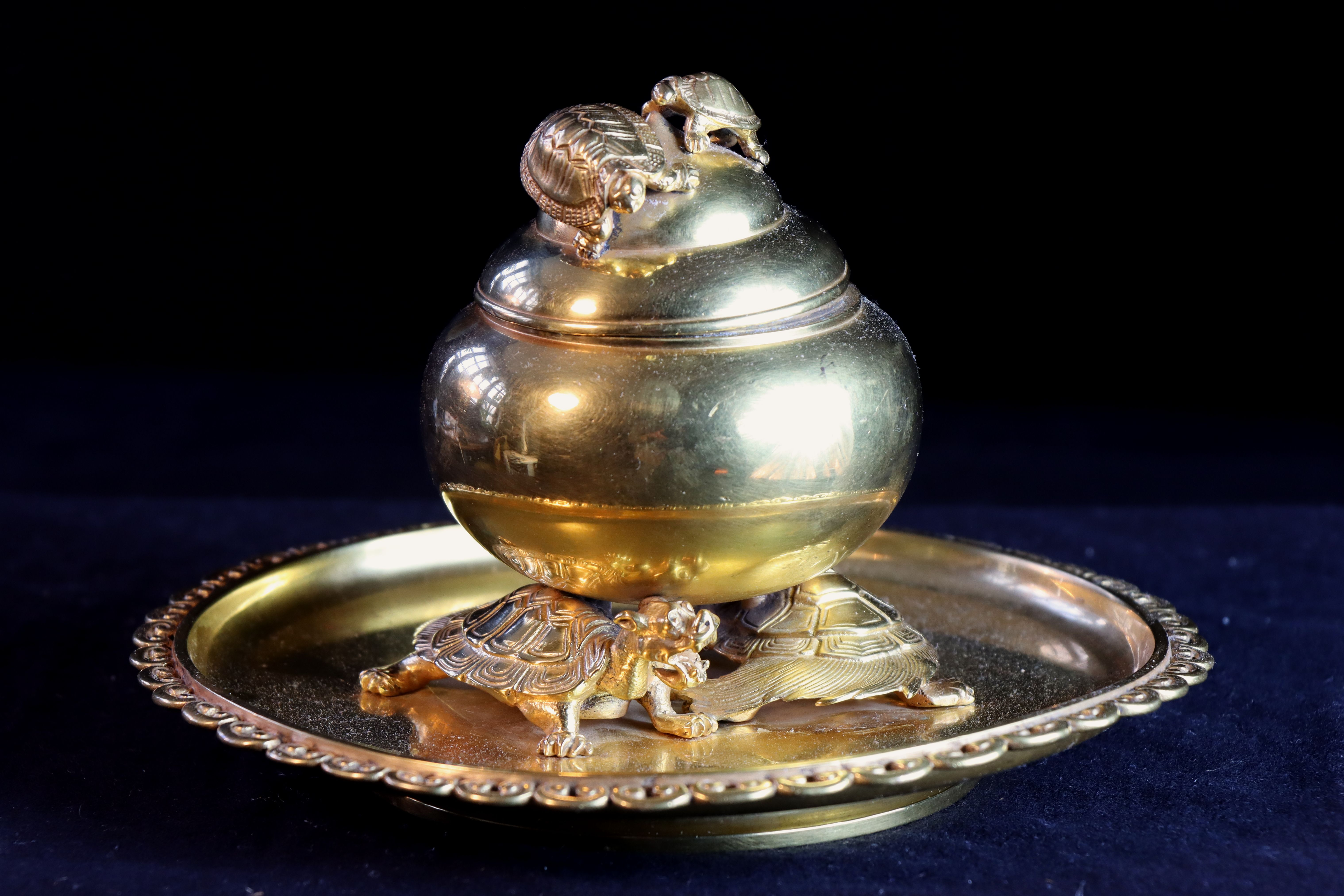 Encrier en bronze et verre du fondeur Ferdinand Barbedienne, vers 1875. H : 11 cm.